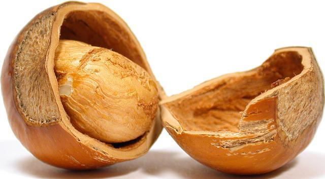 Haselnuss